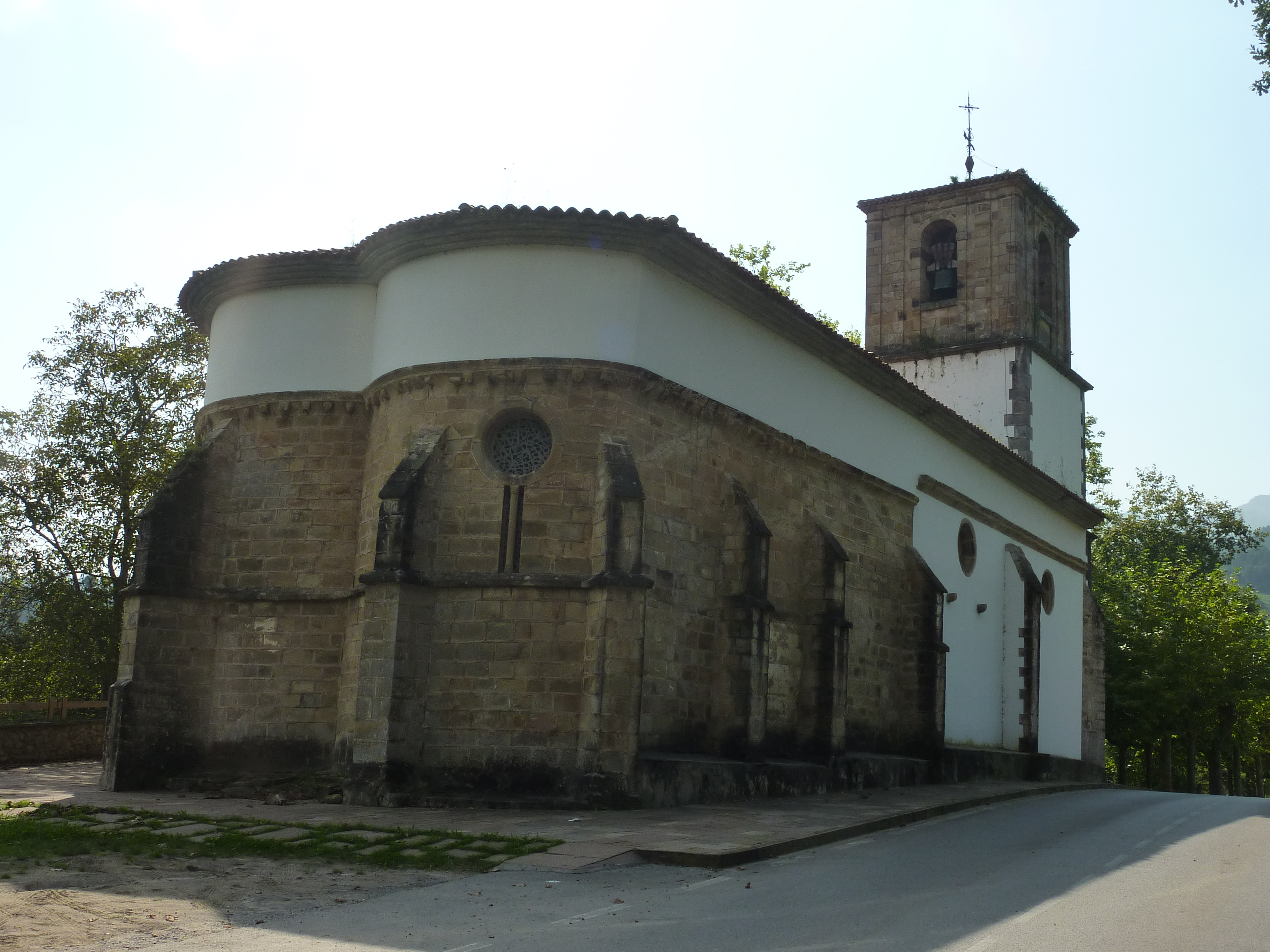 Ampuero (Cantabria, España)